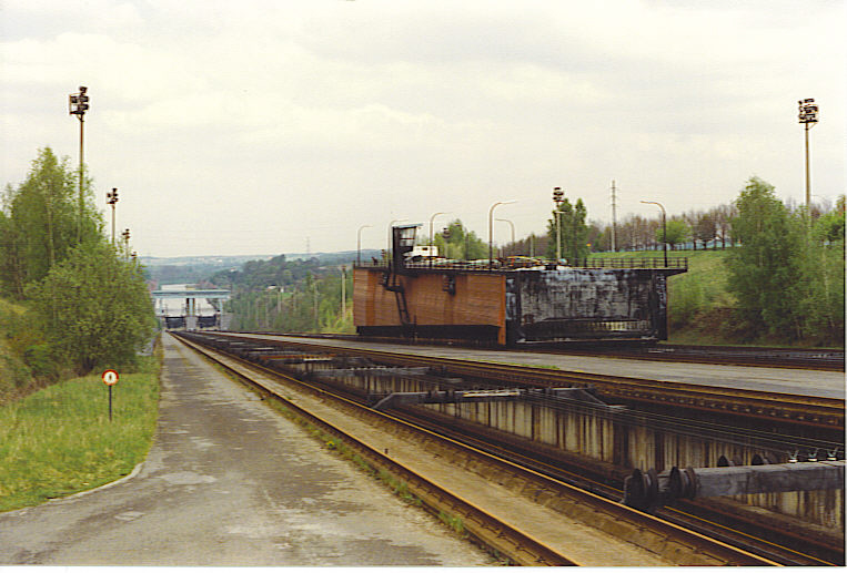 zelf gemaakt